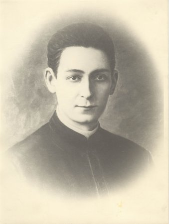 August Franciszek Maria Anna Józef Kajetan Czartoryski Muñoz, duque de Vista Alegre